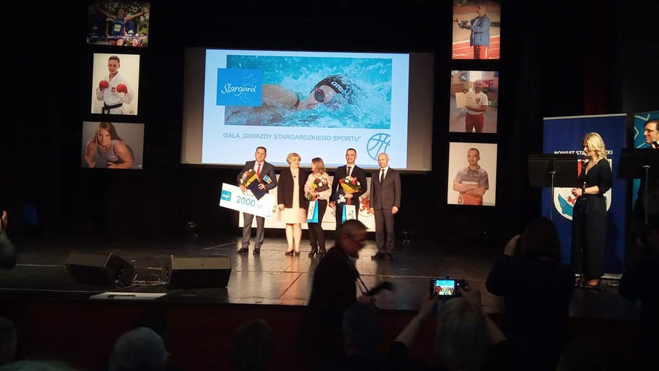 Plebiscyt Gwiazdy Stargardzkiego Sportu 2018